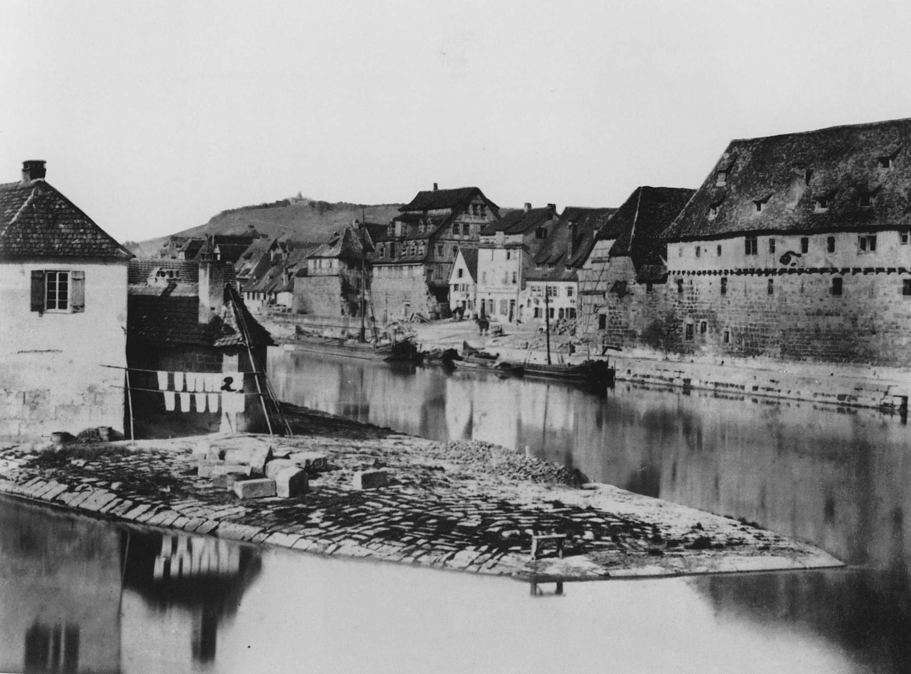 Blick über den Hefenweiler auf die Untere Neckarstraße in Heilbronn. Am rechten Bildrand die 1866 abgebrochenen Gebäude Heuscheuer und Farrenstall des Katharinenhospitals.